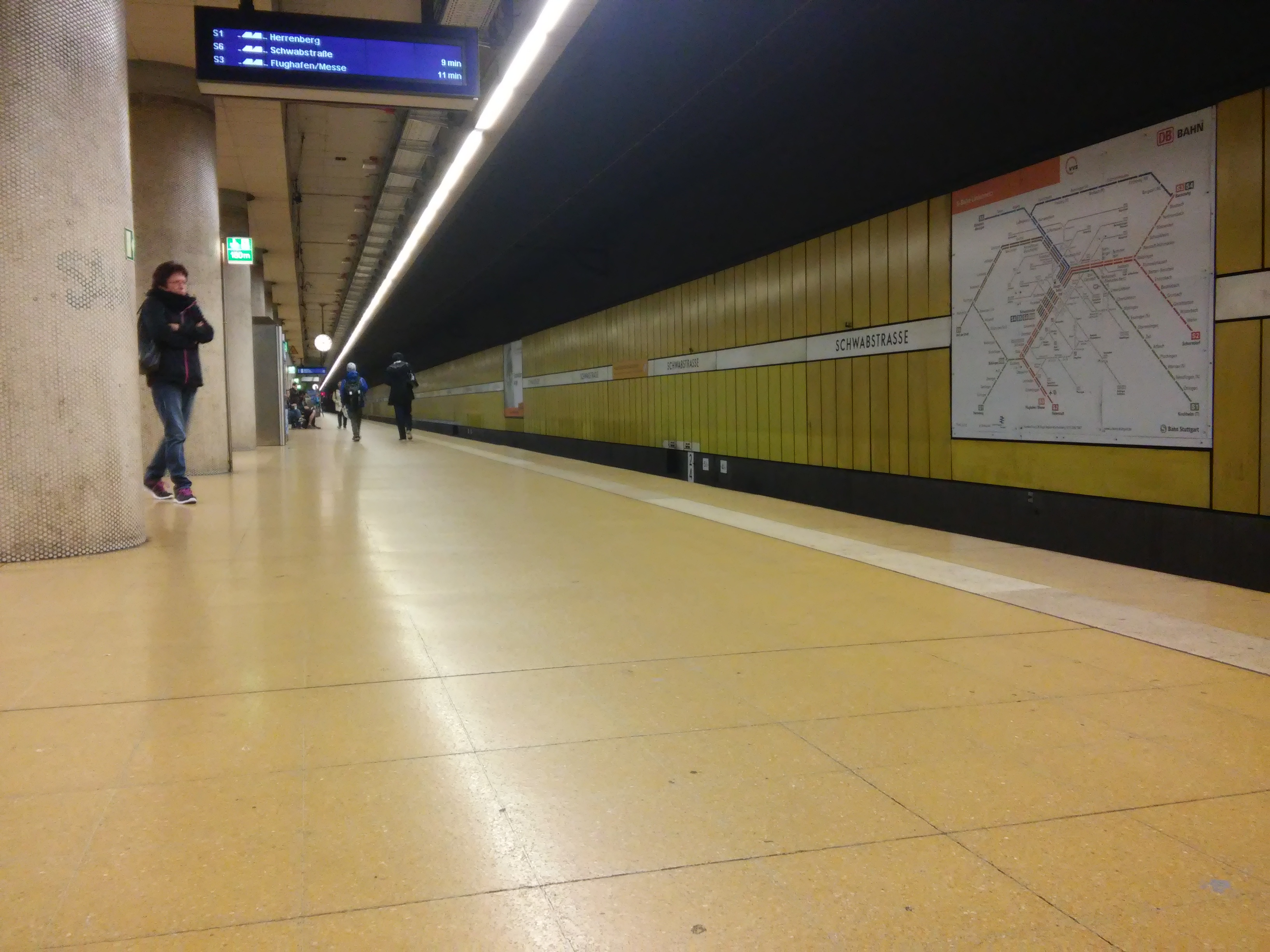 Bahnsteig der S-Bahn-Station Schwabstraße